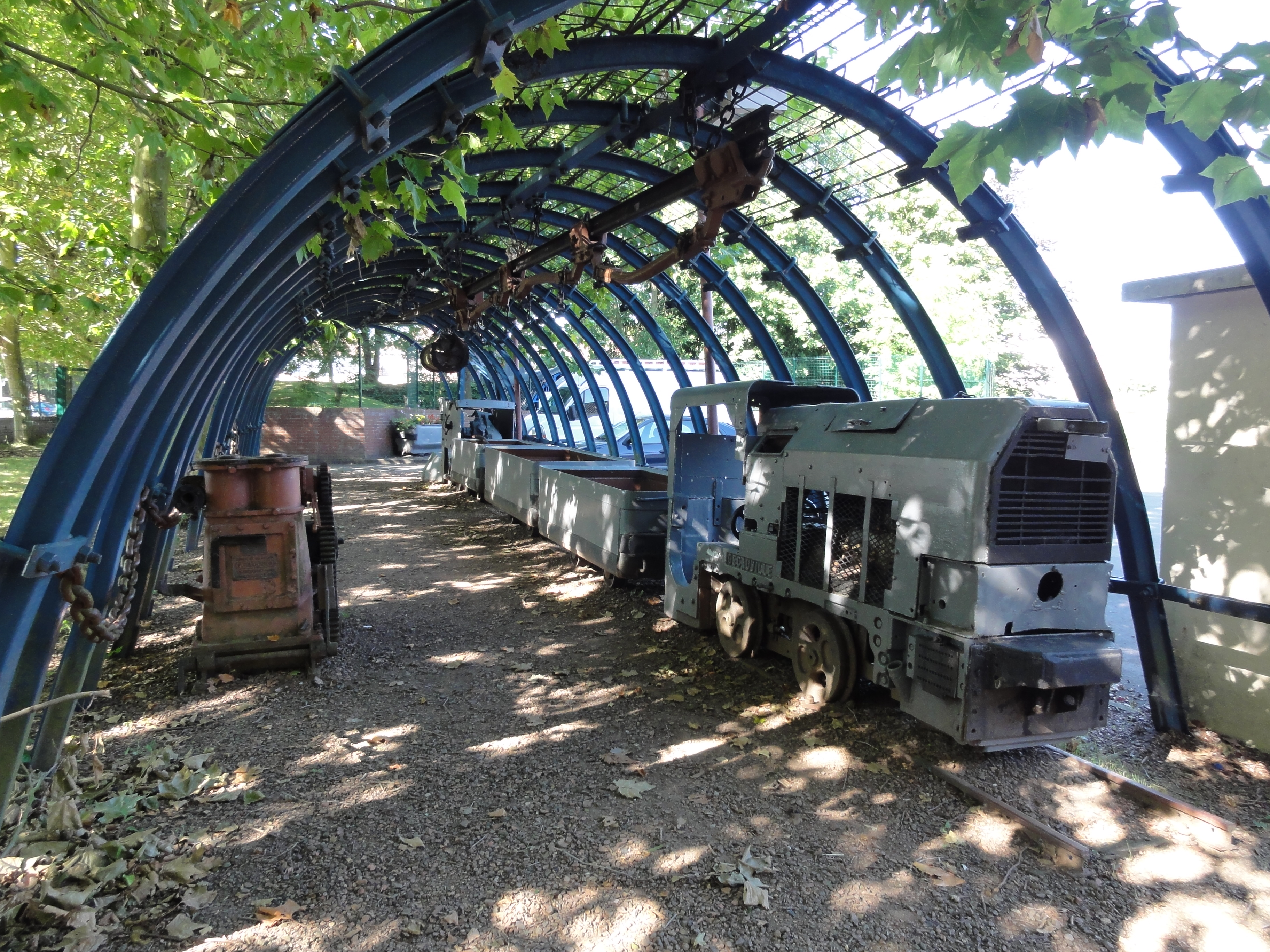 Musée de la mine, Nœux-les-Mines, Pas-de-Calais, Nord-Pas-de-Calais, France.